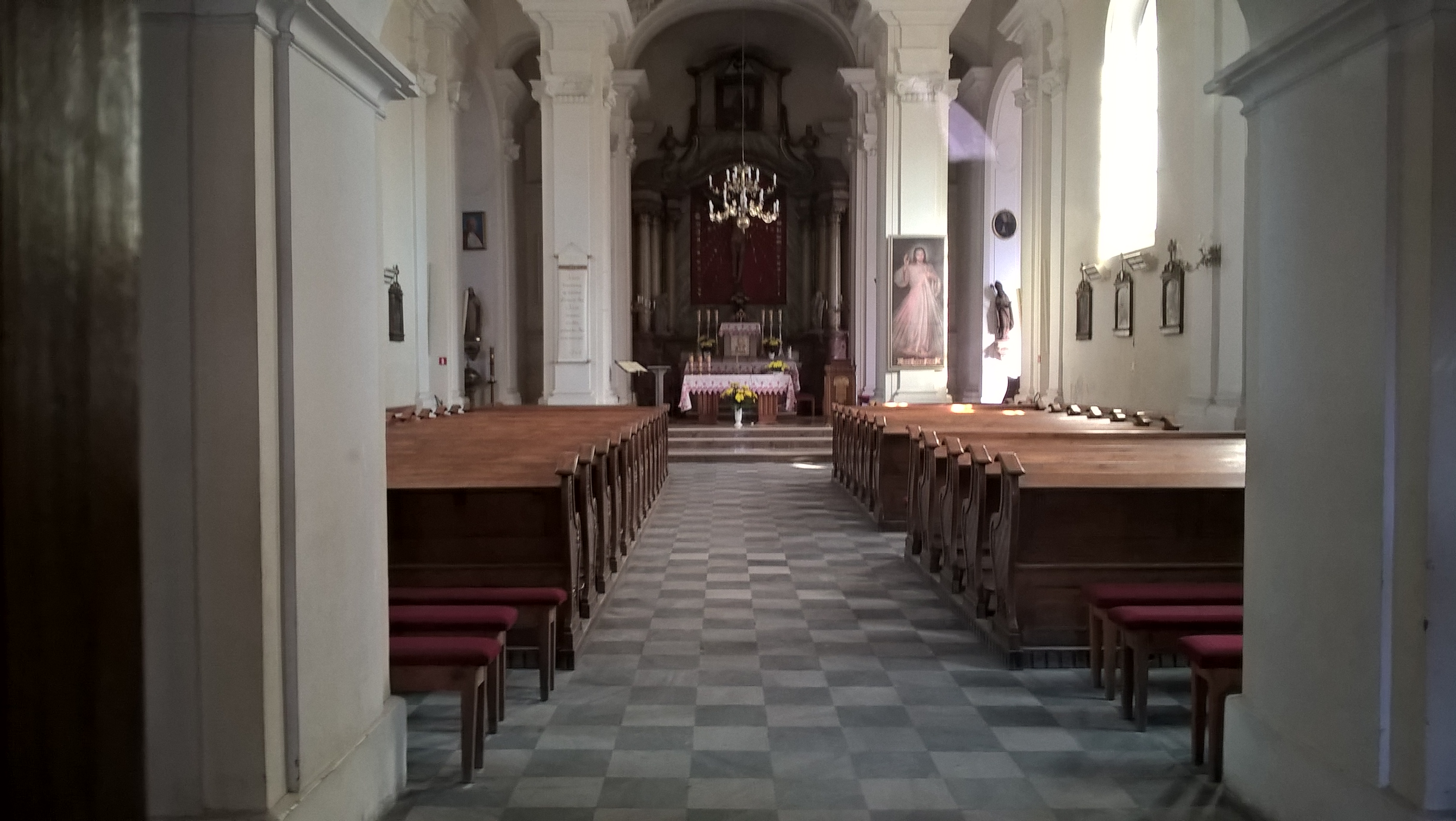 Kościół w Biezdrowie - ołtarz główny